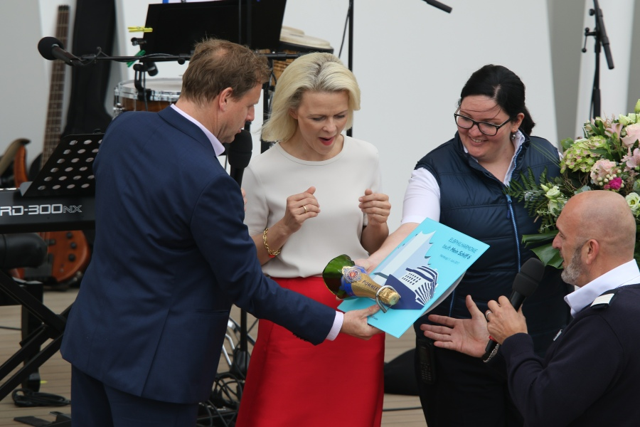 Iveta Apkalna, die Taufpatin der Mein Schiff 6, erhält die Erinnerungsplakette mit dem Hals der Taufflasche "Elbphilharmonie / tauft Mein Schiff 6 / Hamburg, 1. (...)"